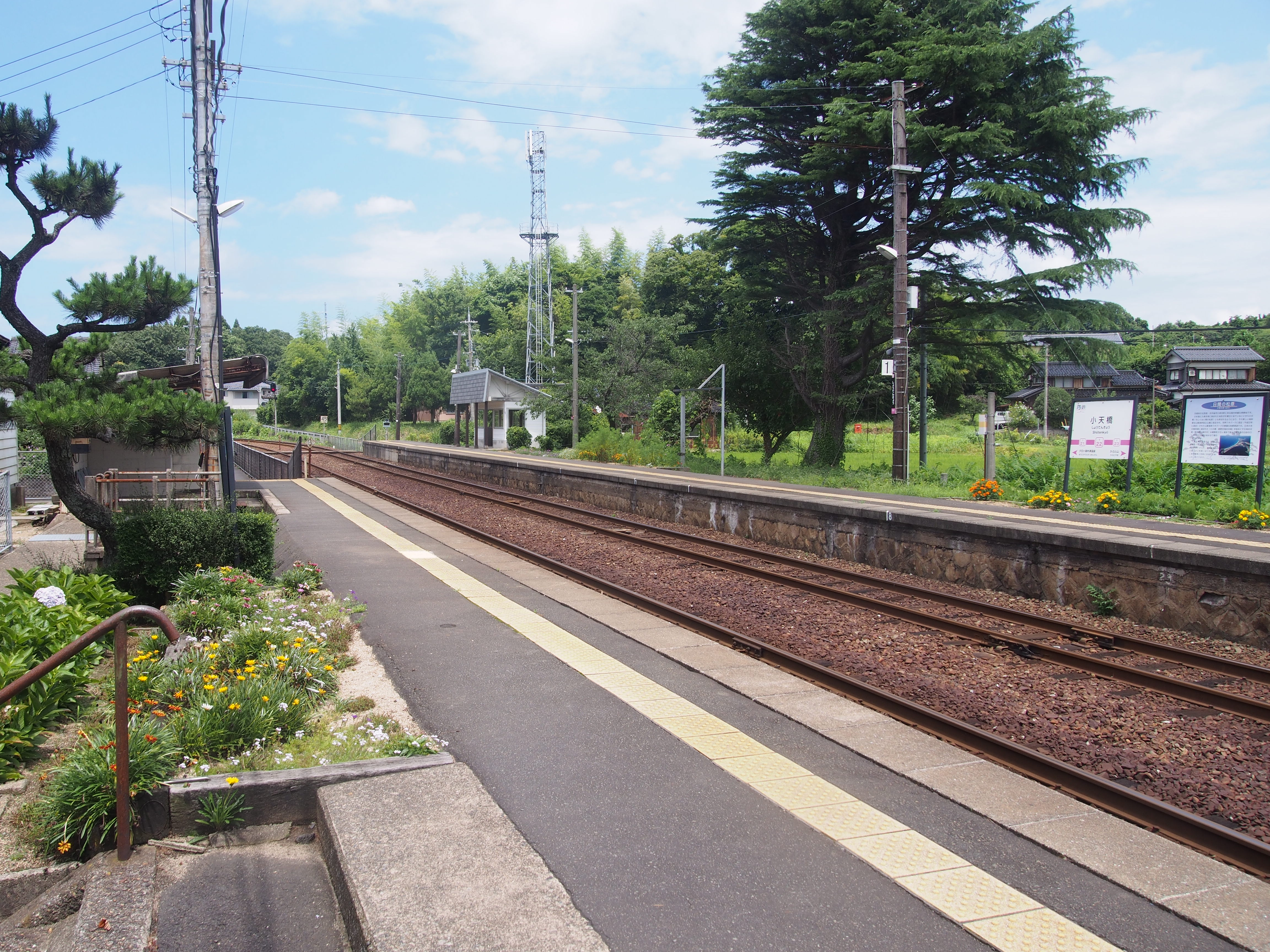 小天橋駅ホーム。駅舎付近より北側を臨む。